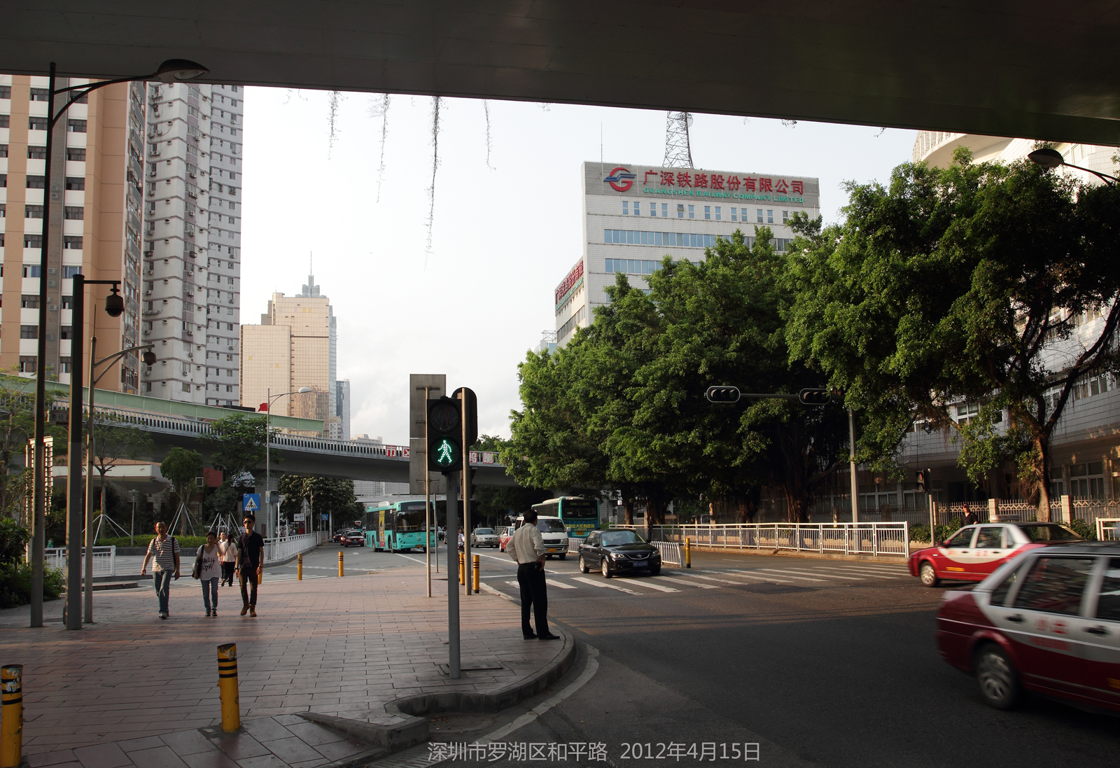 和平路 he ping lu